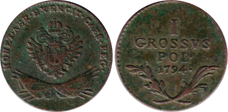 1 grosz 1794 Galicja